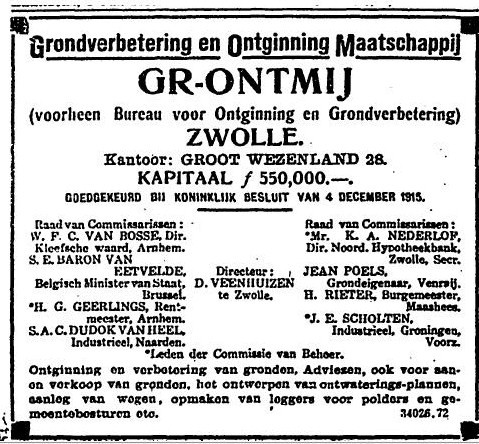 Advertisement for Grontmij